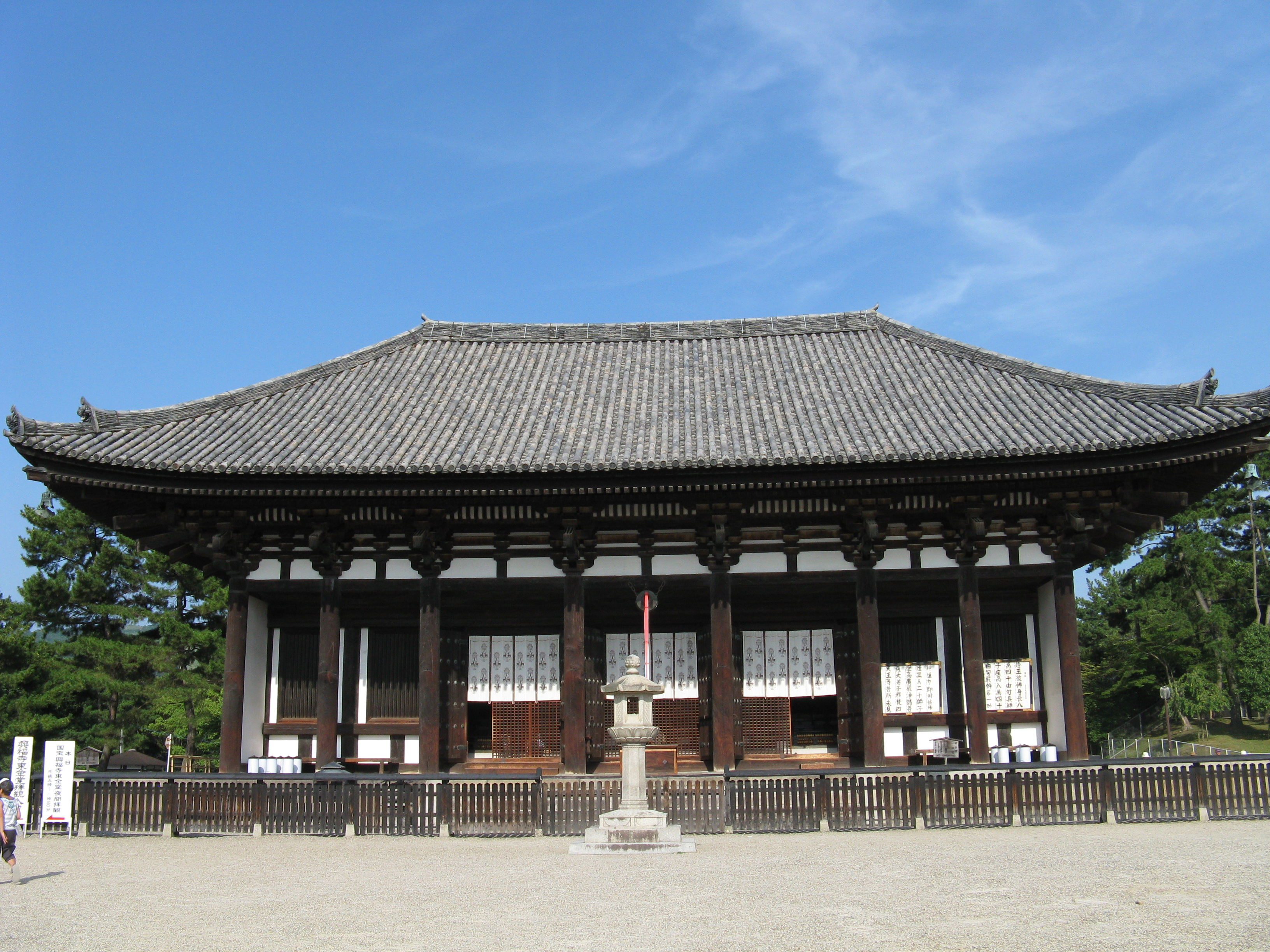 興福寺 東金堂